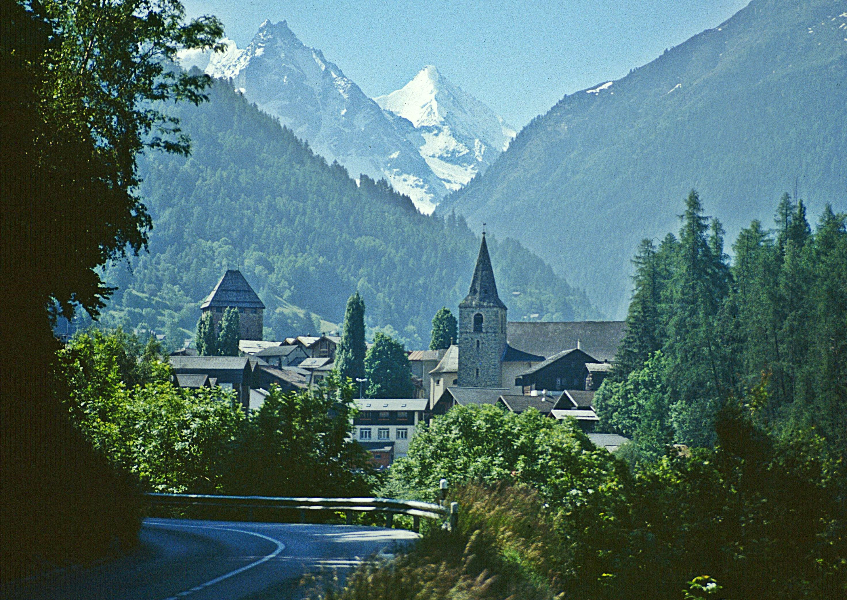 Val d'Anniviers: Vissoie